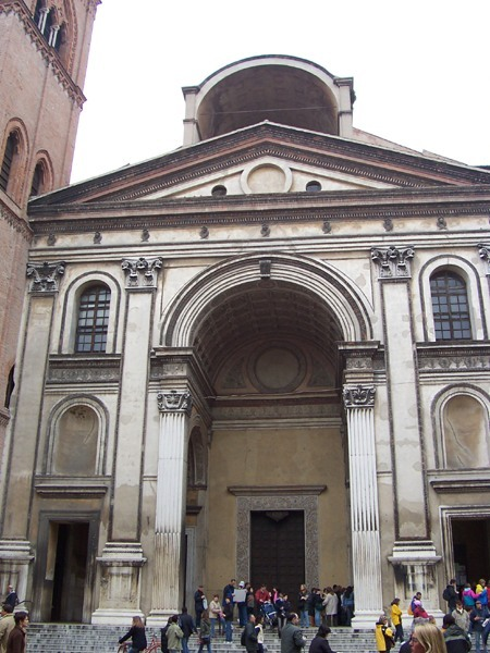 Basilica di Sant'Andrea a Mantova.